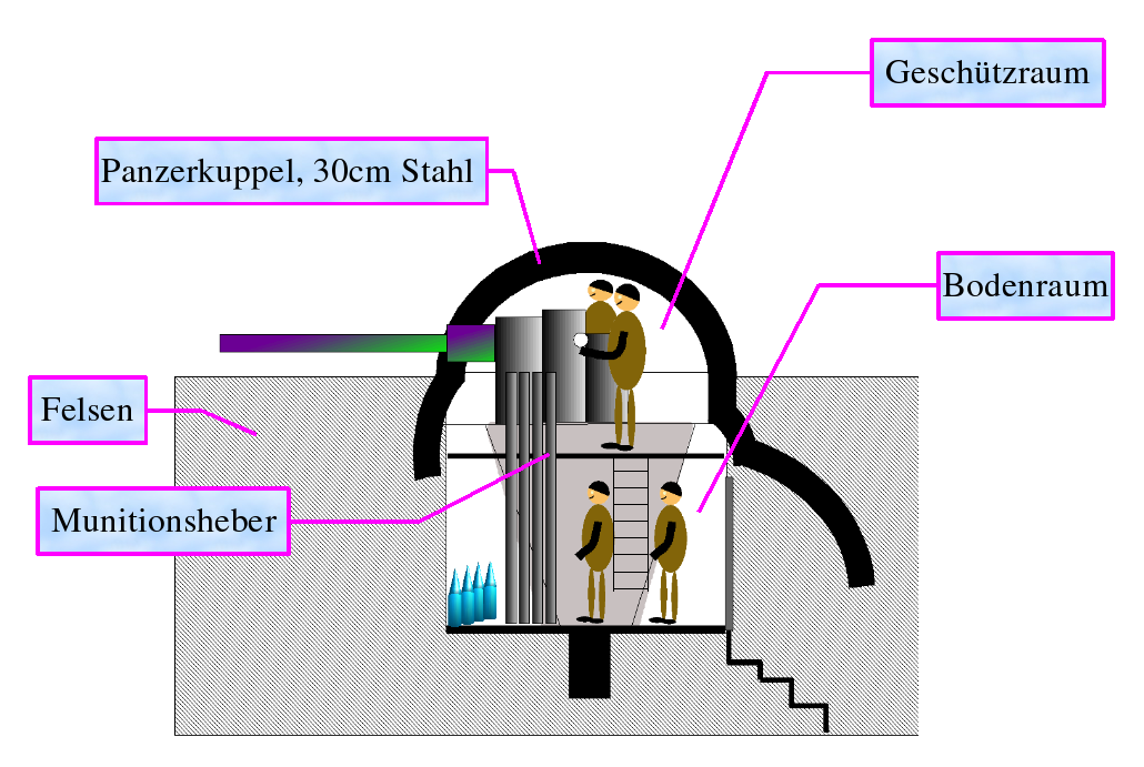 Skizze einer 10,5cm Turmkanone unter Panzerkuppel